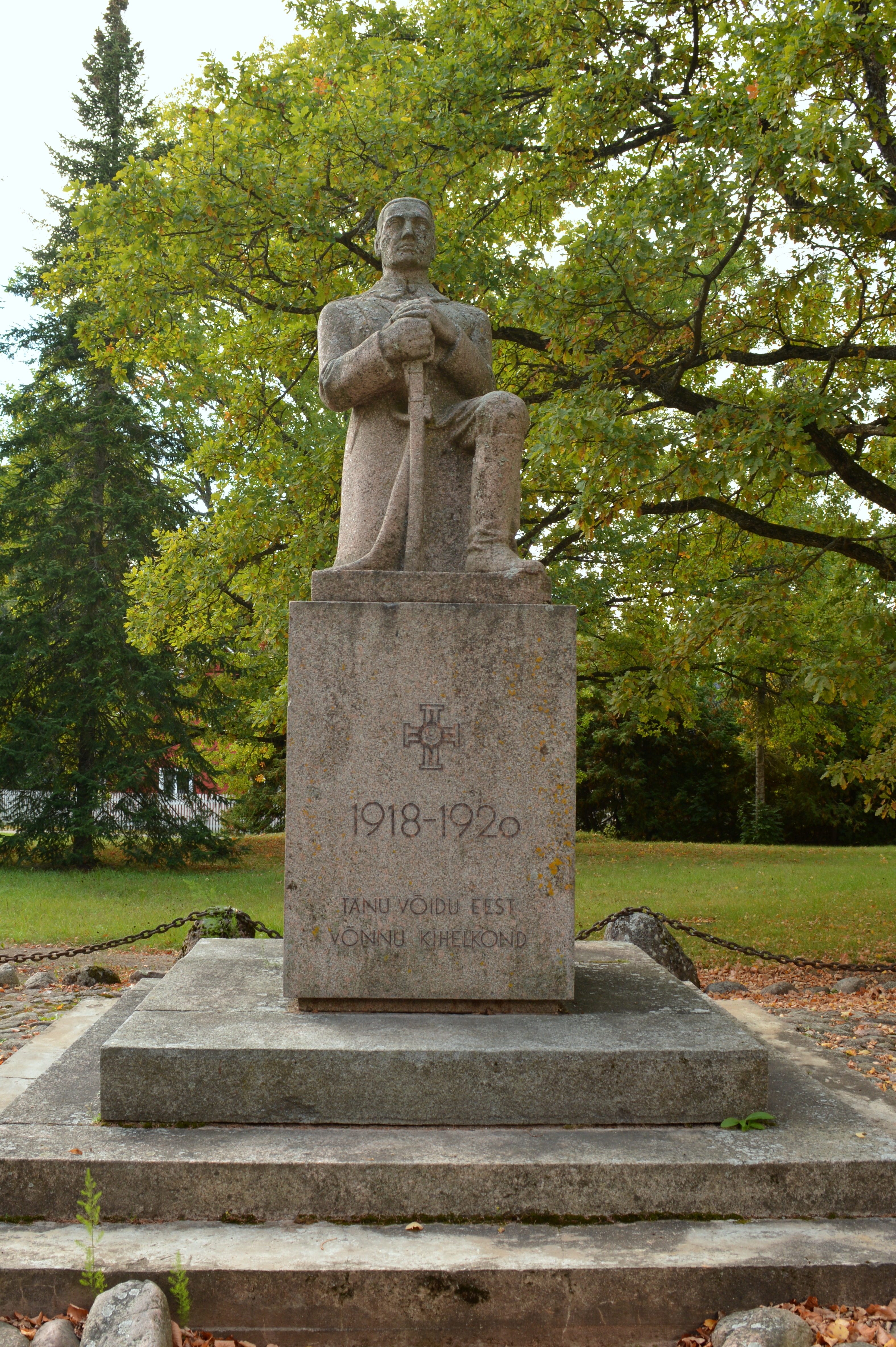 Vabadussõja mälestussammas